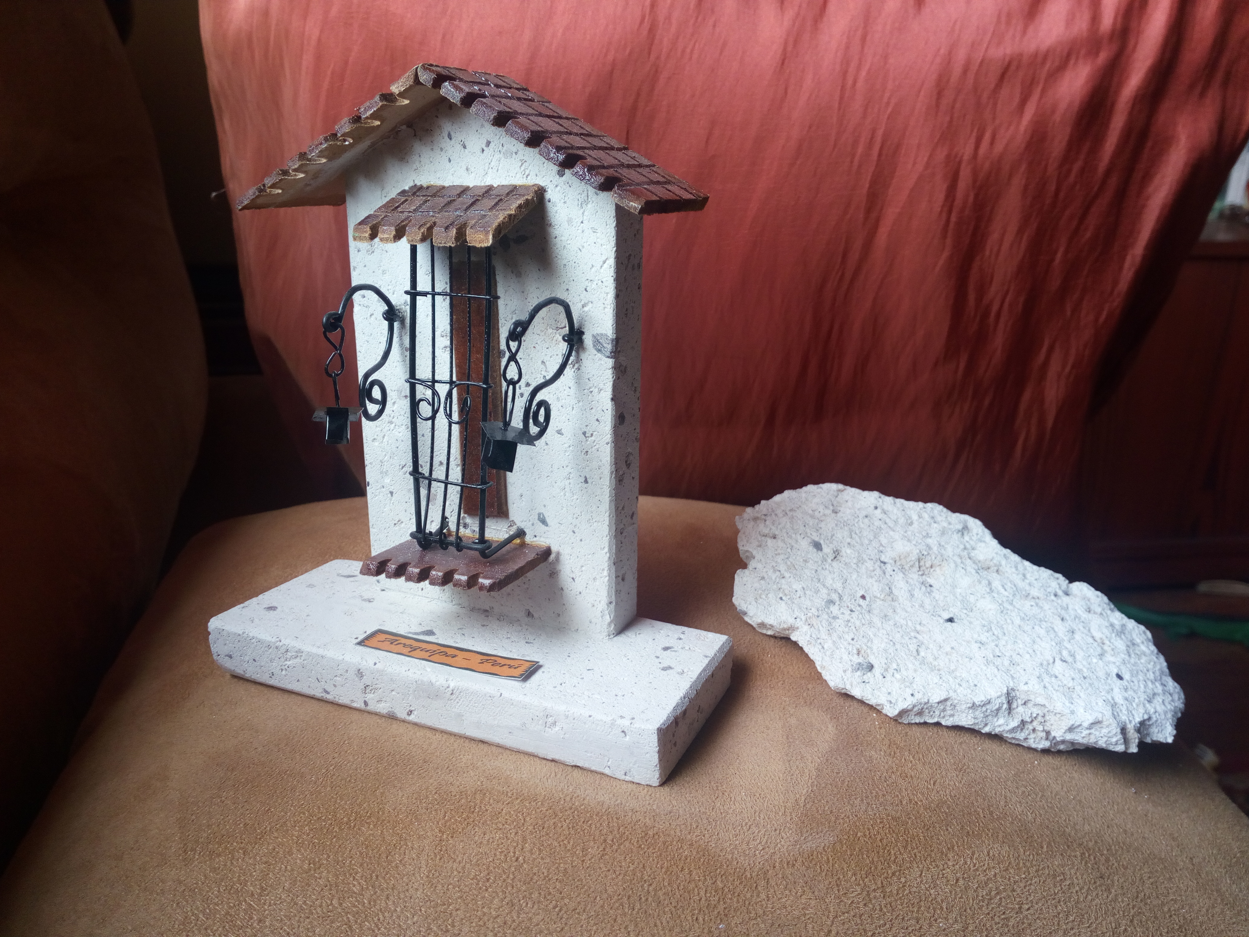 Sillar volcánico de Arequipa. Artesanía y trozo extraído de una cantera de Cerro Colorado.